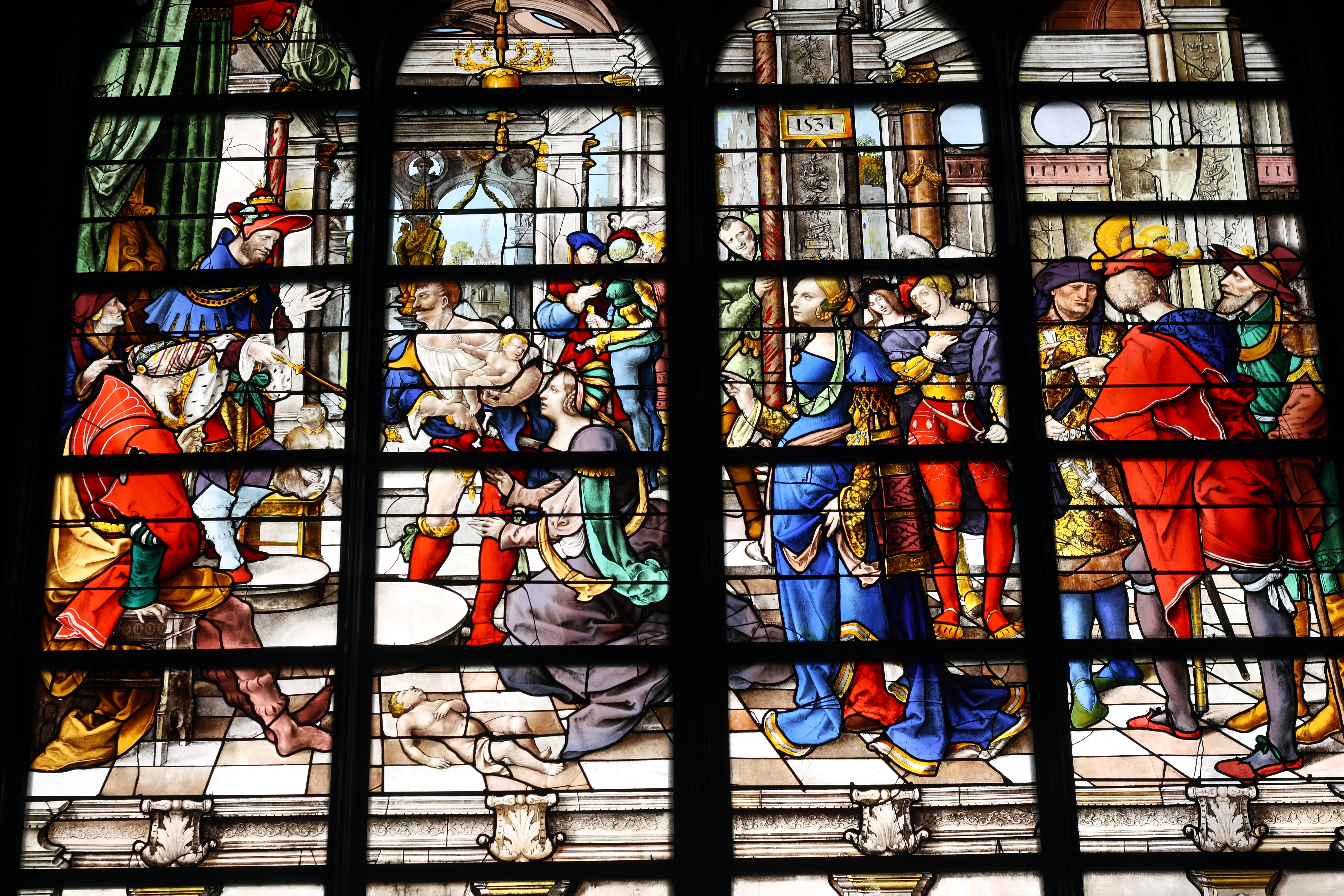 Bleiglasfenster (südliches Seitenschiff) in der Kirche St-Gervais-St-Protais in Paris, Darstellung: Urteil des Salomon